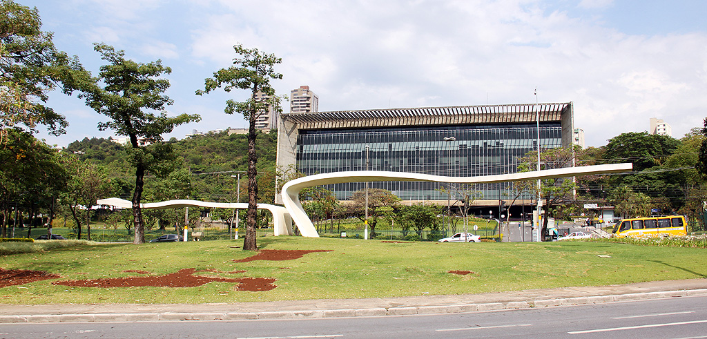 Praça Pedro Melo em Belo Horizonte, com a escultura da artista Tomie Ohtake e a sede da usiminas ao fundo.